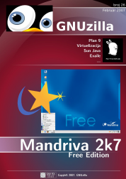 GNUzilla magazin 26, naslovnica